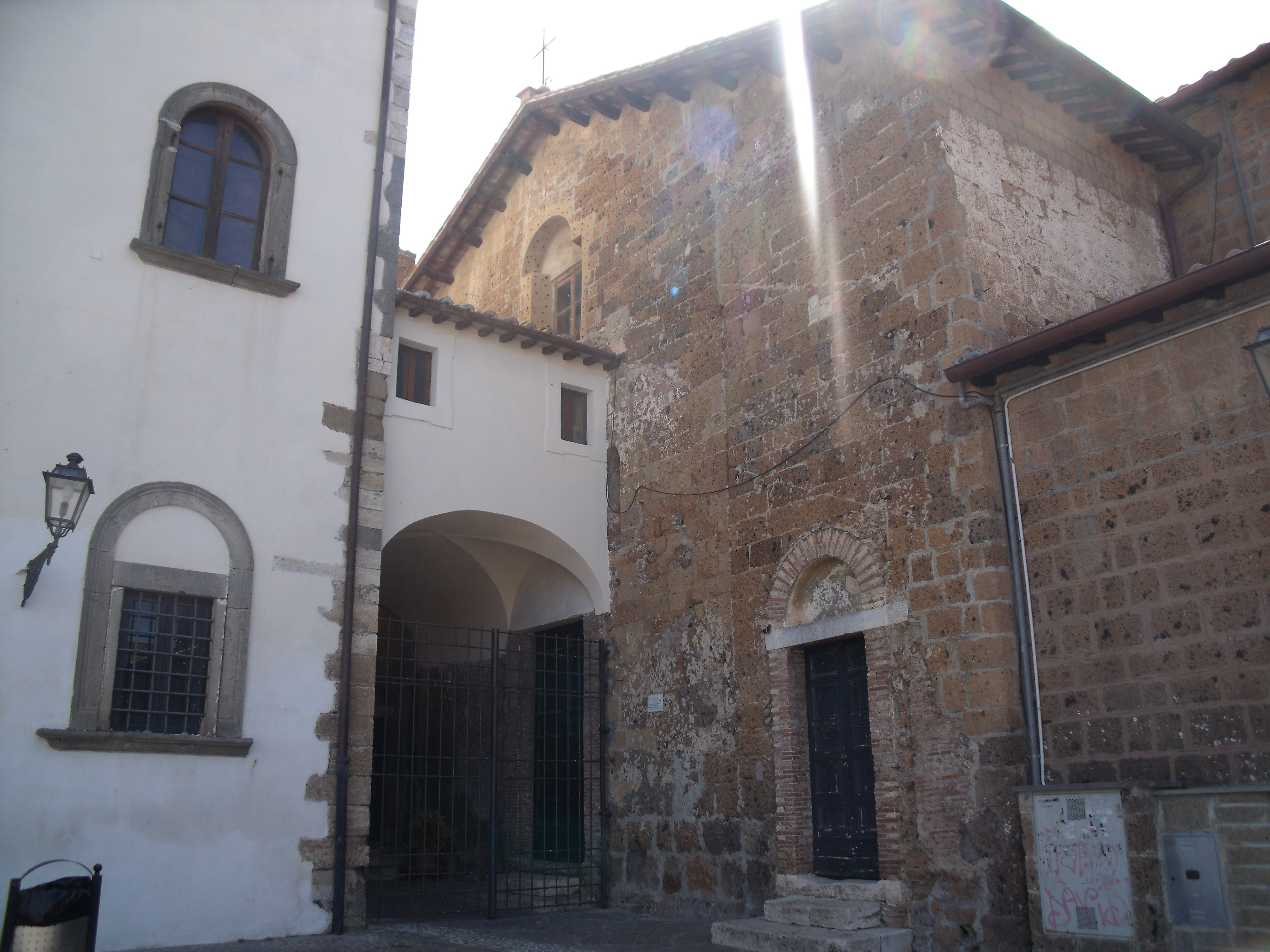 Facciata della vecchia Chiesa di Santa Maria Maggiore di Cerveteri.